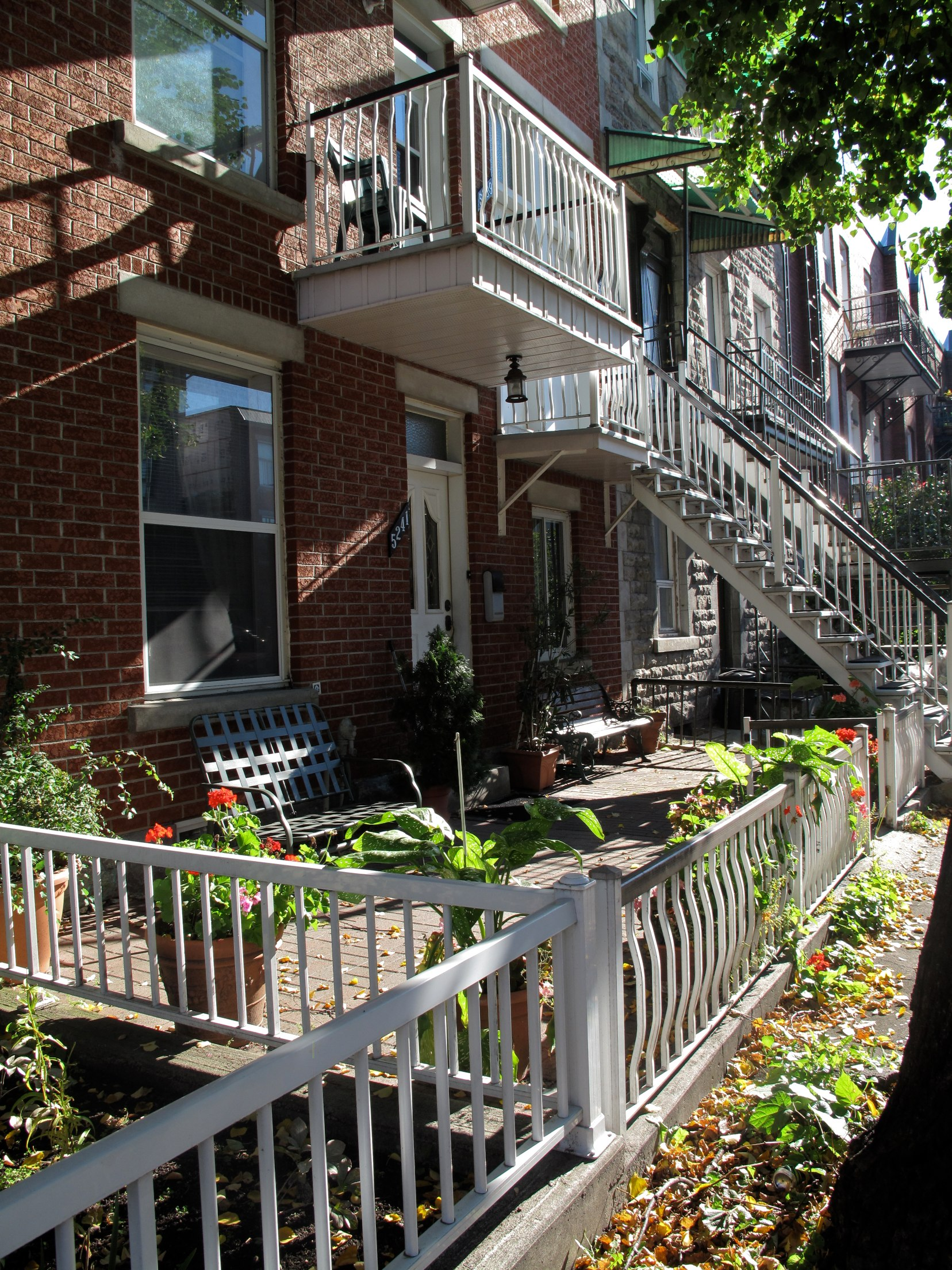 randonnée urbaine 5.10.10 Mile End